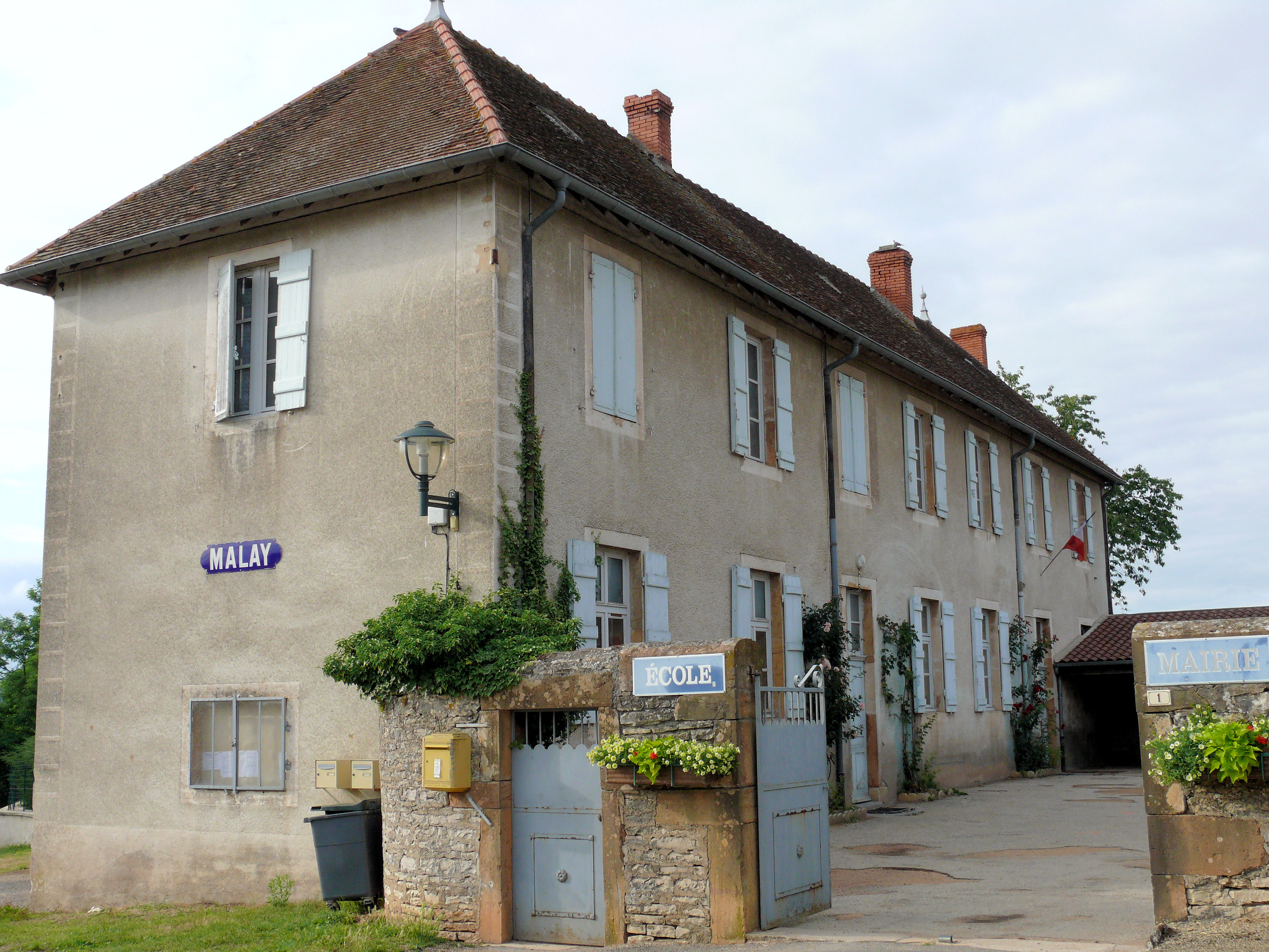 Malay - Mairie et école